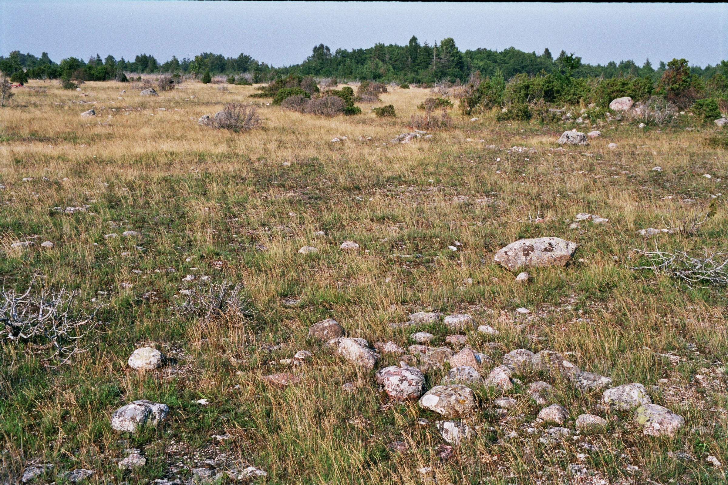 Kalmeväli